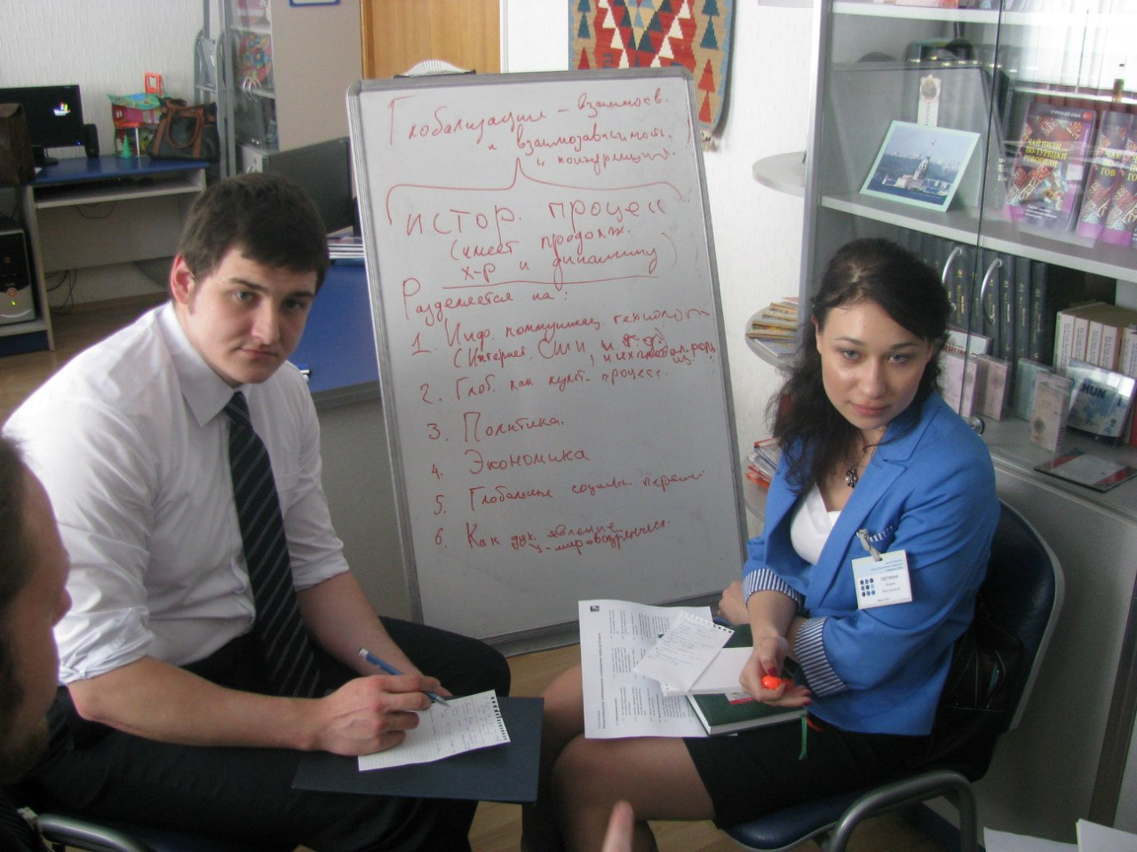 Мозговой штурм на проекте "Умные сети"